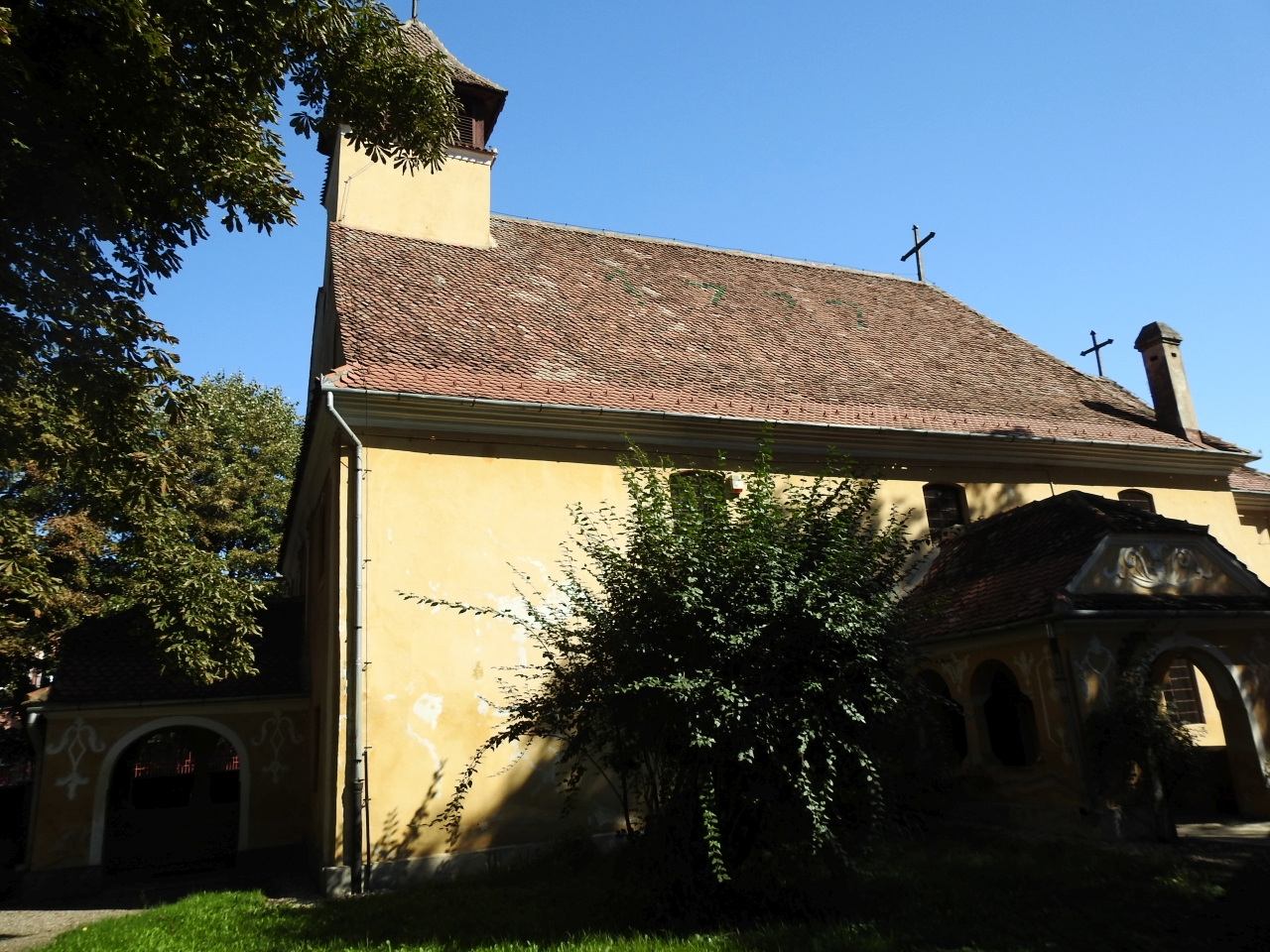 Ansamblul bisericii evanghelice „Blumăna”